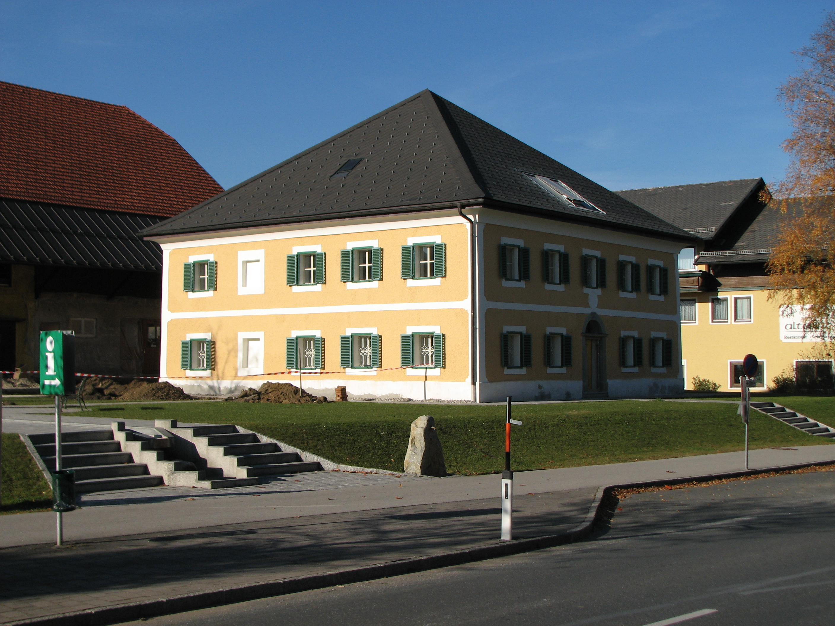 Bürgerhaus, Schmiedbauerngut